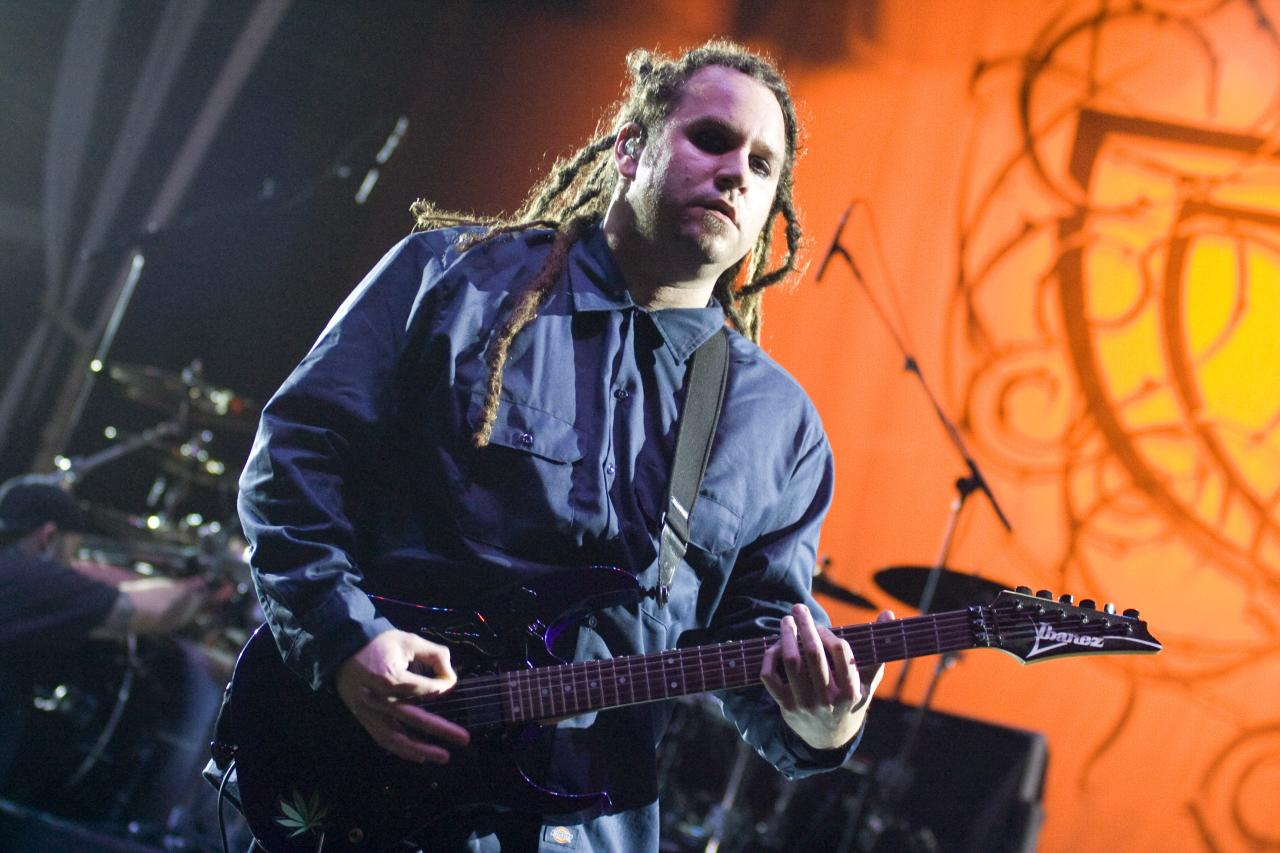 Evanescence @ Maquinaria Festival - 08/11/2009 - São Paulo, Brasil É proibida a cópia ou reprodução deste material sem a autorização do autor. Por favor, não publique nada daqui sem o devido crédito. Fotógrafo: Alexandre Cardoso